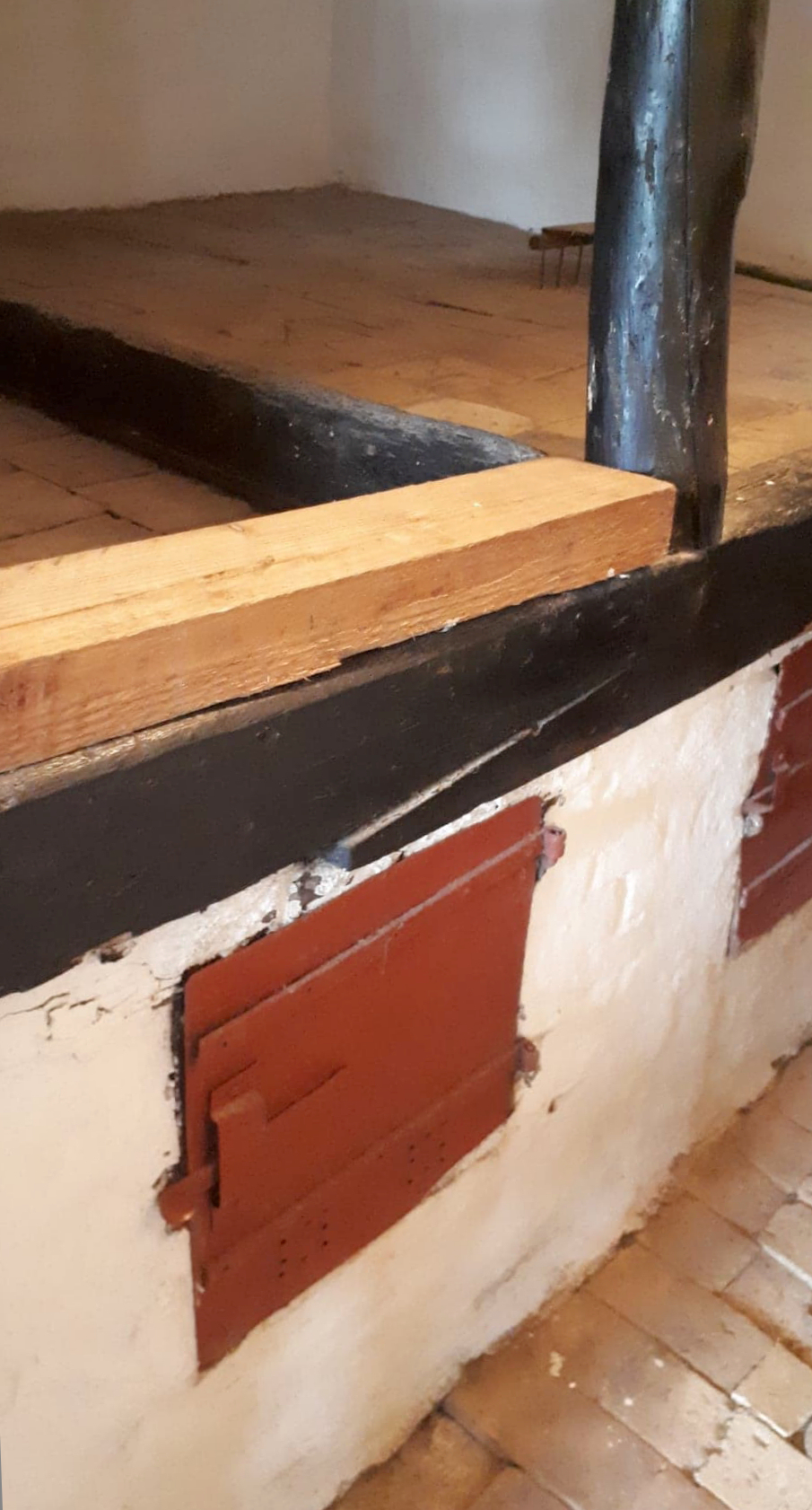 Damgård_Mølle, Denmark